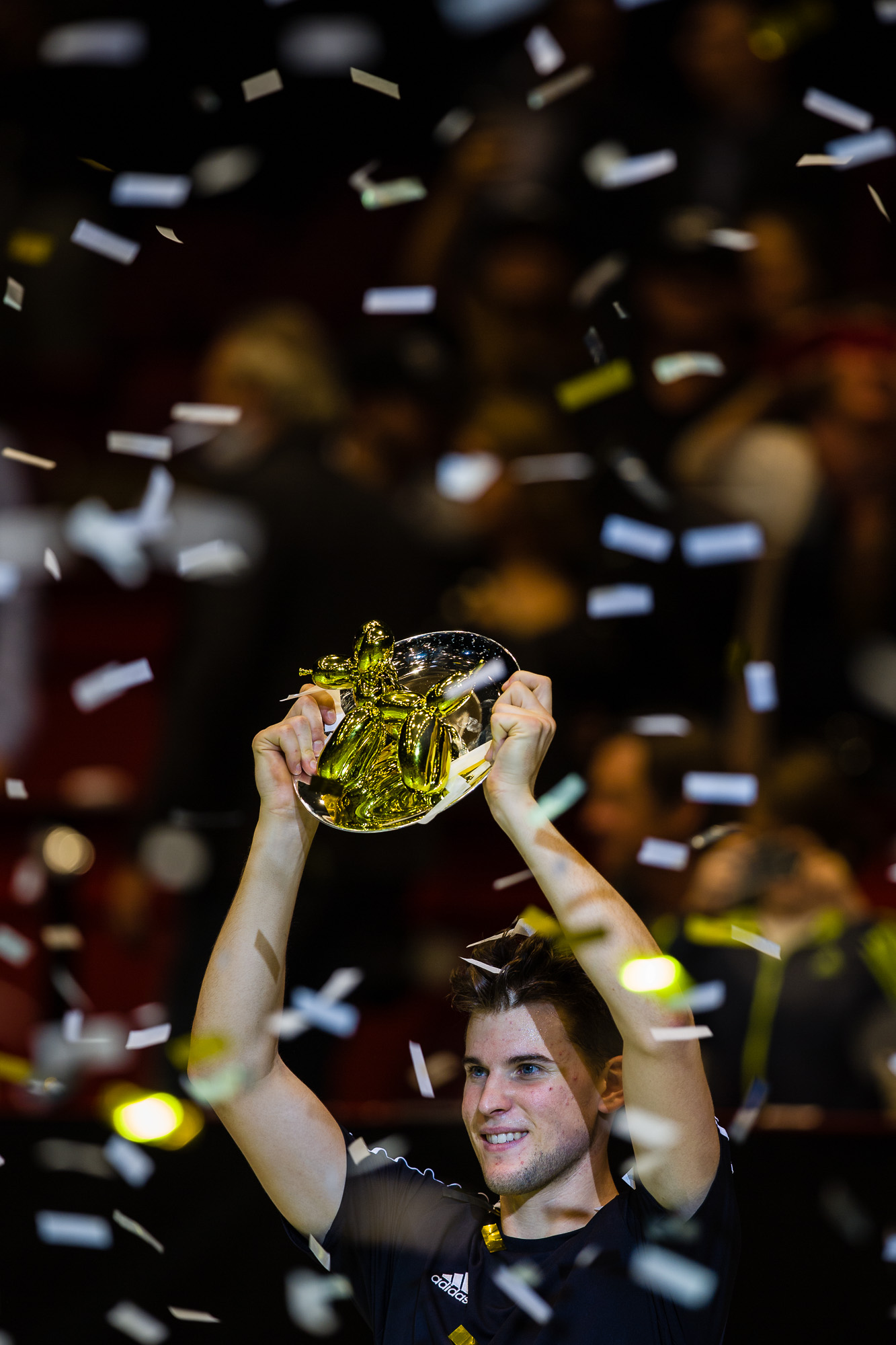 Dominic Thiem (AUT) als Sieger der Tie Break Tens in Wien am 23.10.2016 (side event der Erste Bank Open ATP World Tour 500 2016)